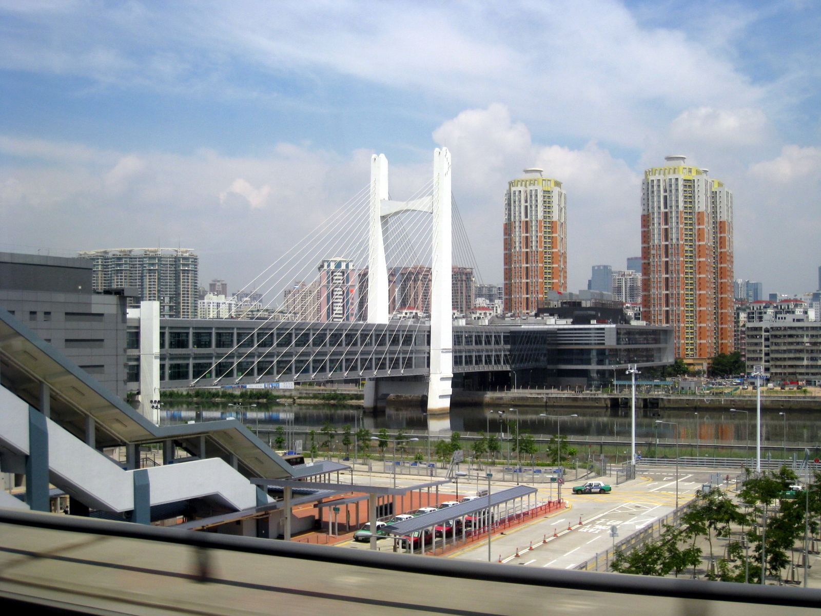 Shenzhen FongTin to Hong Kong Bridge